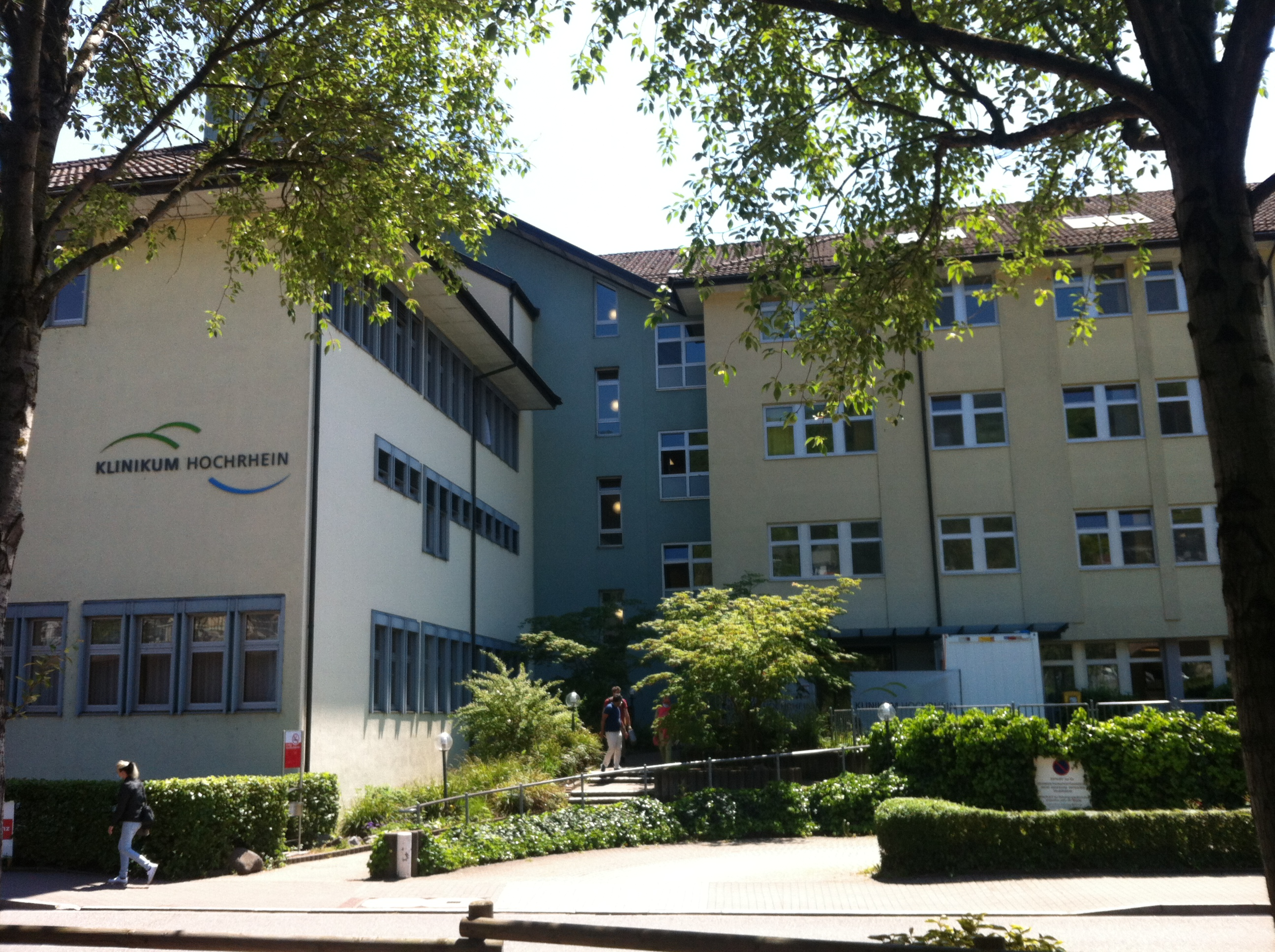 Klinikum Hochrhein: Krankenhaus Waldshut in Waldshut-Tiengen im Landkreis Waldshut in Baden-Württemberg. Bereich Haupteingang.